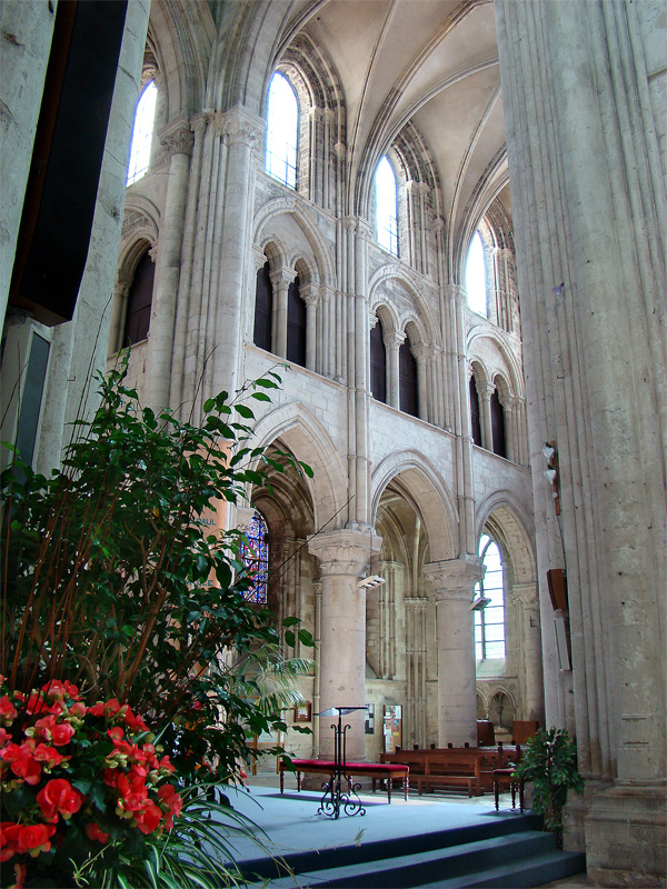 Cathédrale Saint-Pierre de Lisieux, Calvados, Normandie, France.